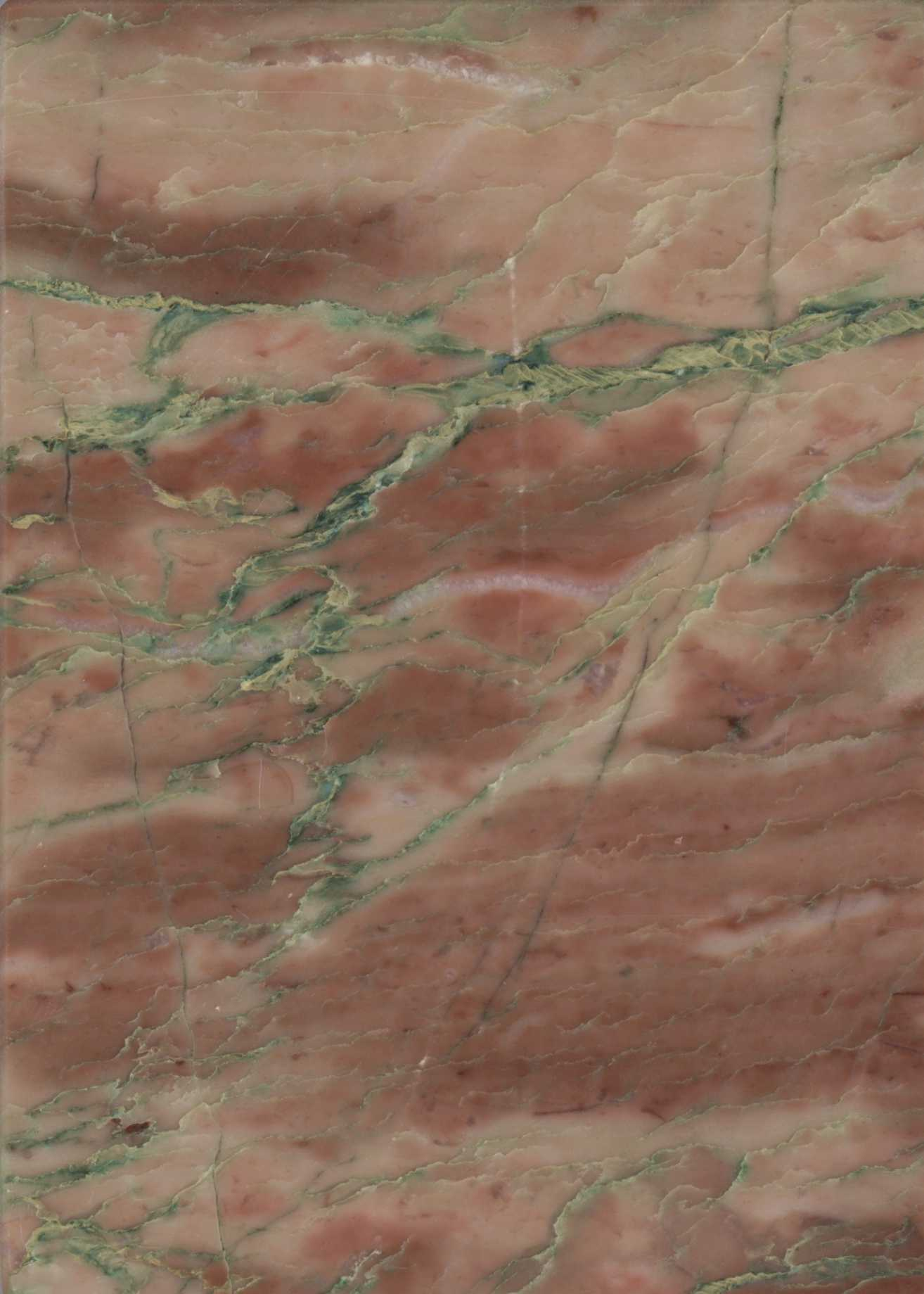 Kalkstein Horwagen (geographisch/geologisch korrekt); (auch Marxgrüner Marmor, Deutsch Rot)